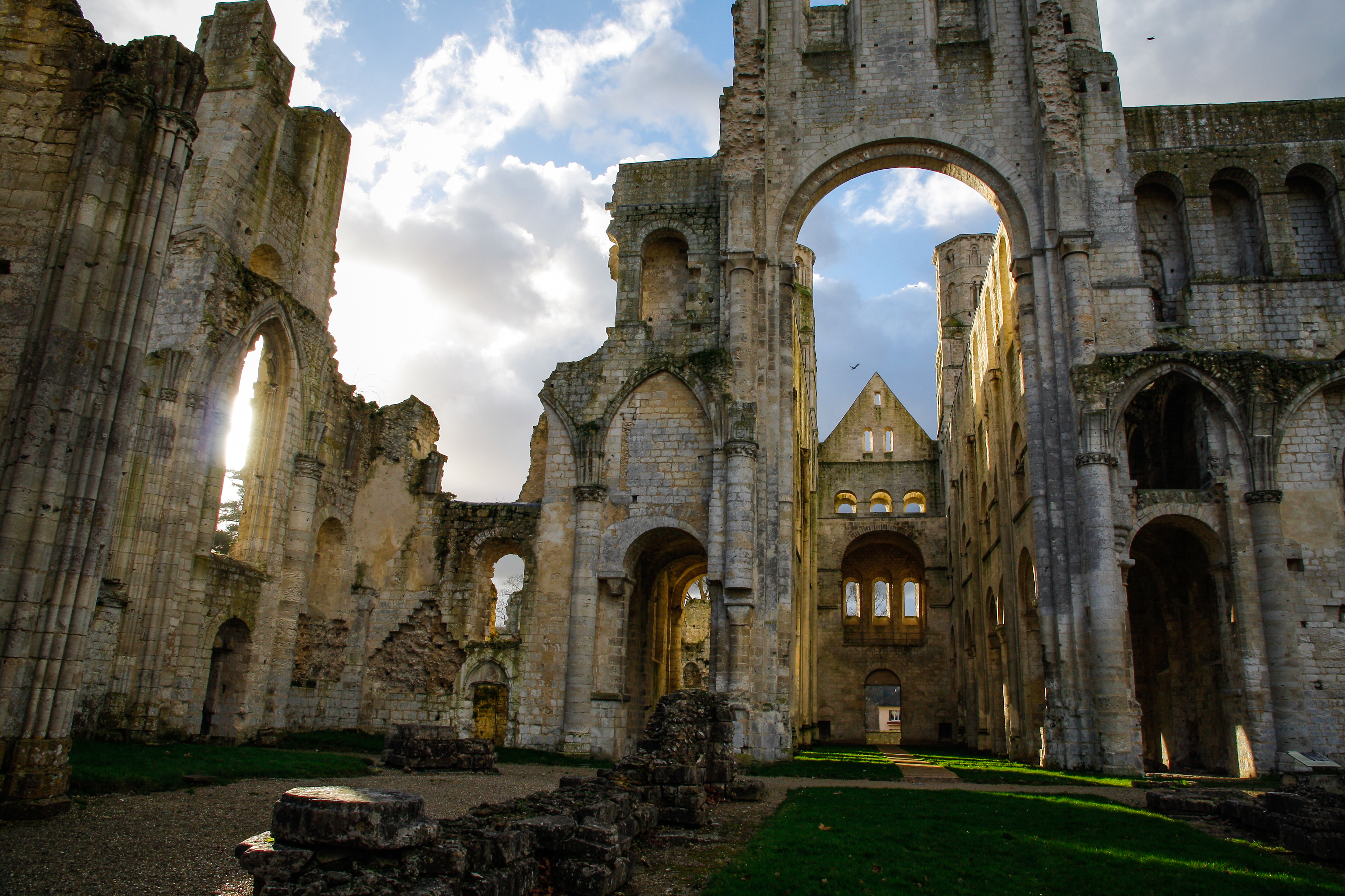 Ruines de l'abbaye, vue du choeur